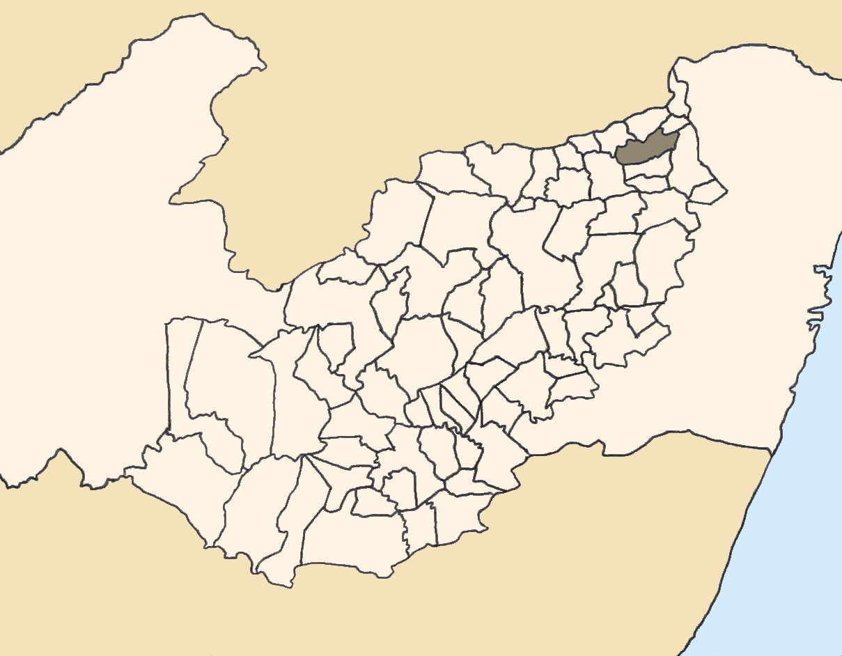 Mapa da mesorregião Agreste de Pernambuco (Brasil) subdivida em municípios. Em destaque, o município de Bom Jardim. Map of the brazilian state of Pernambuco (mesorregião Agreste) showing the city of Bom Jardim. Imagem tratada com o GIMP. Image made with GIMP.